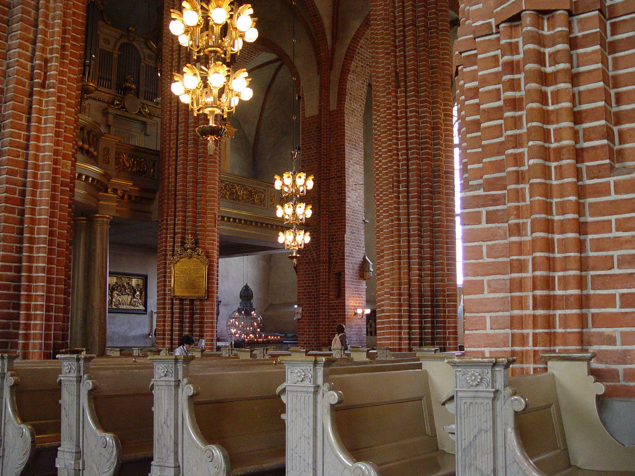 Storkyrkan in Stockholm, Gamla stan.